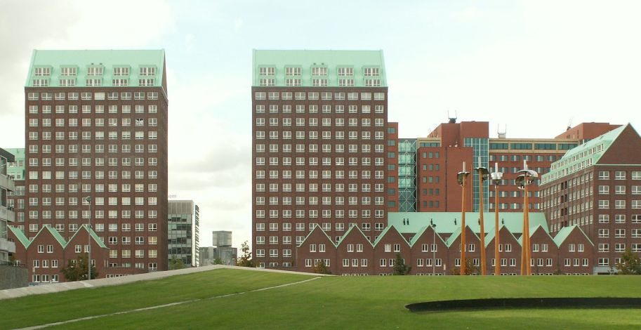 Eigen opname, licht bewerktt (kleine perspectiefcorrectie & uitsnede) Categorie:Afbeelding bouwwerk Rotterdam